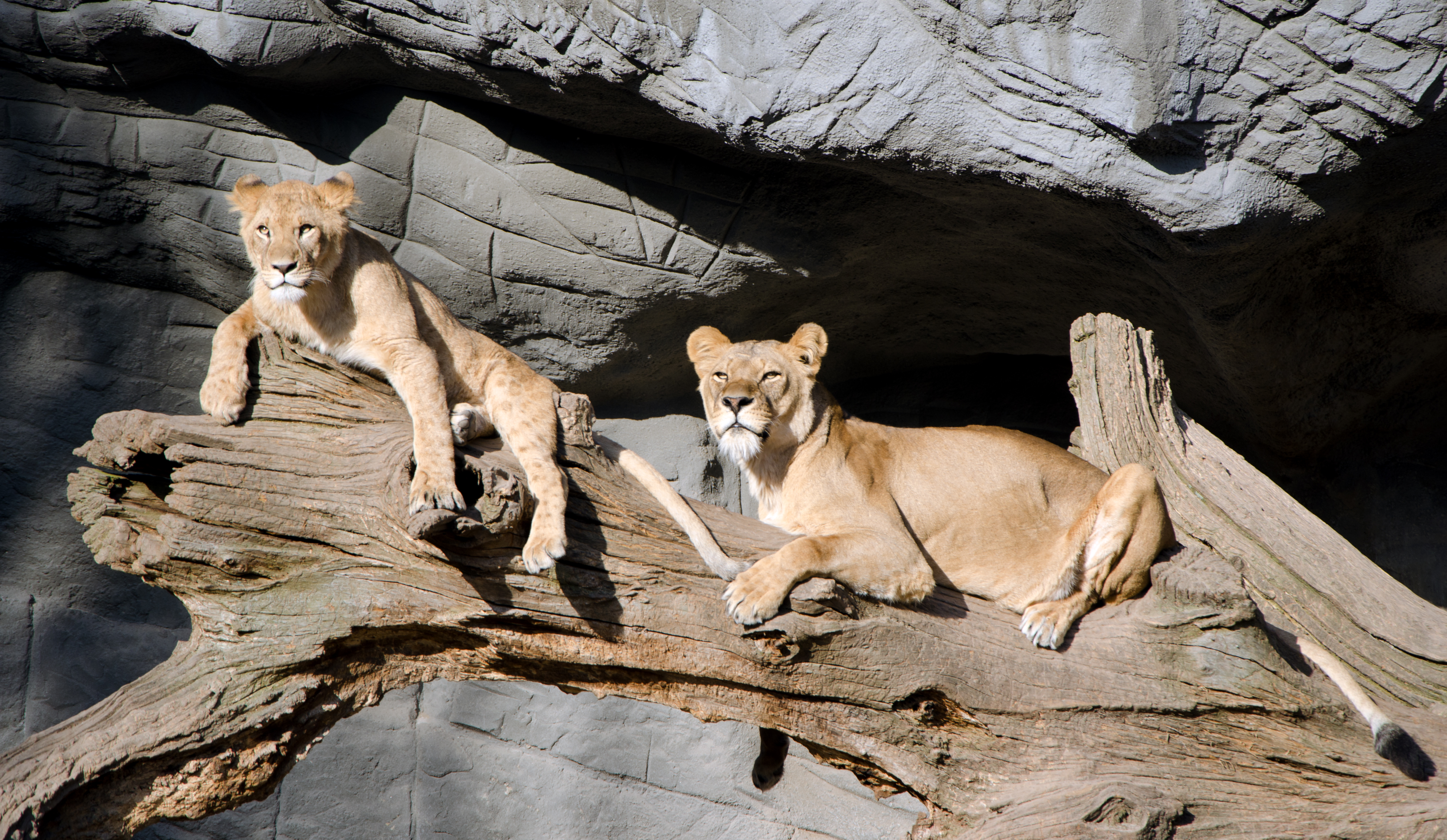 Löwen im Tierpark Hagenbeck